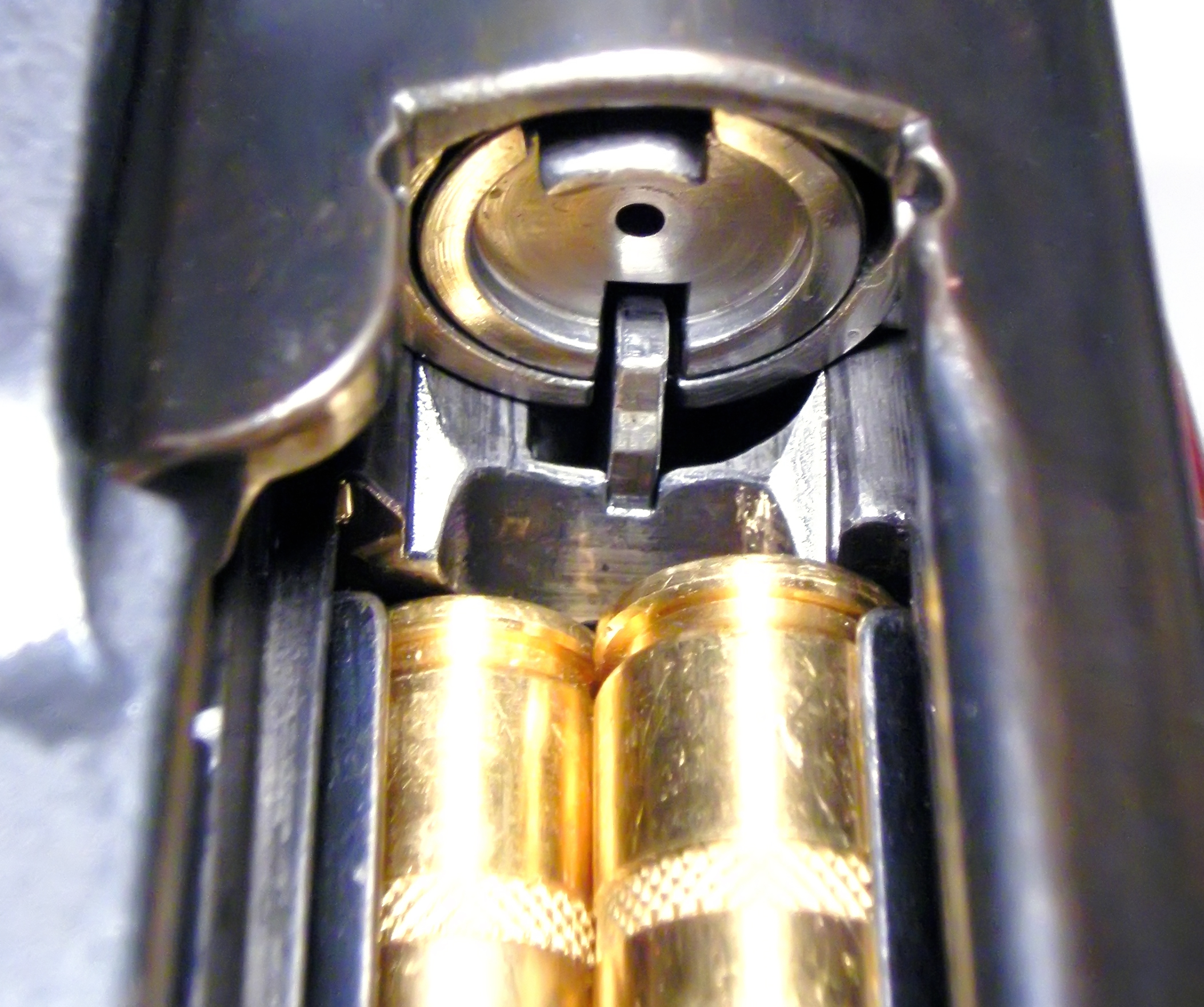 Mousqueton 31 Détail de l'éjecteur mobile